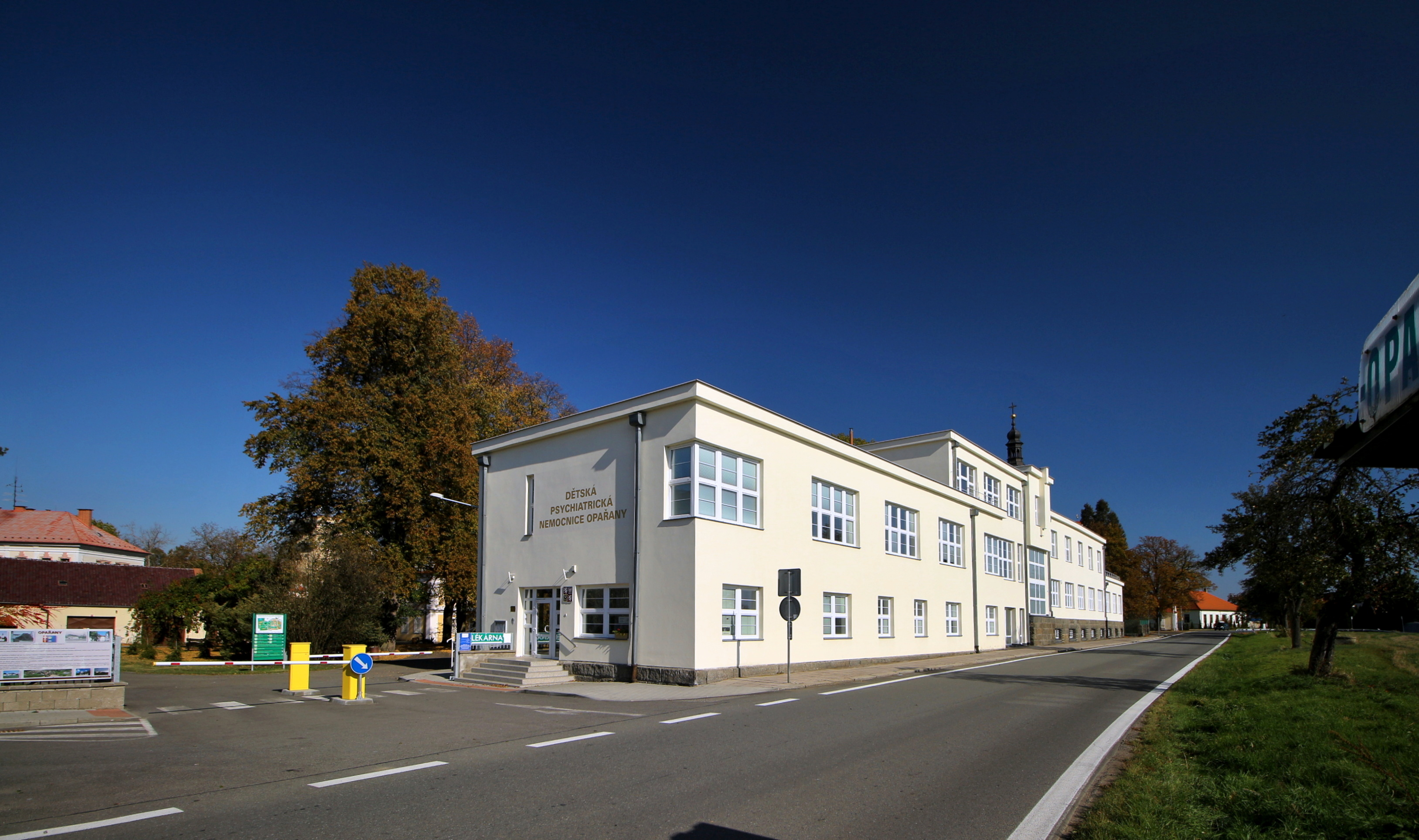 Opařany, okres Tábor